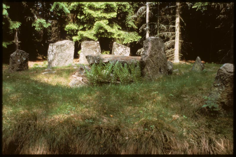 Dös i stensättning. "Påls hus", Svenneby 118:1. Motiv: Svenneby 118:1 Kategori: Stenkammargrav Dös i stensättning. "Påls hus", Svenneby 118:1. Svenneby 118:1.